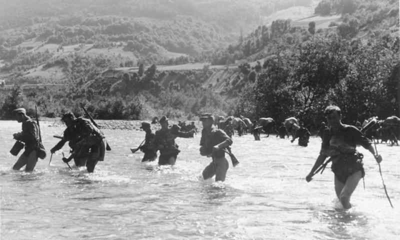 Alban./serb.Grenze Juli 1944 Kein Hindernis ist unüberwindlich Schon wieder ein Hindernis! Gebirgsjäger wissen sich zu helfen - ein Spähtrupp hat eine Furt erkundet, und nun setzt die Kampfgruppe auf diesem Wege ans andere Ufer über. [Scherl Bilderdienst] Srpskohrvatski / српскохрватски: Nemci na granici Kosova (tada Albanije) i Srbije, jula 1944.